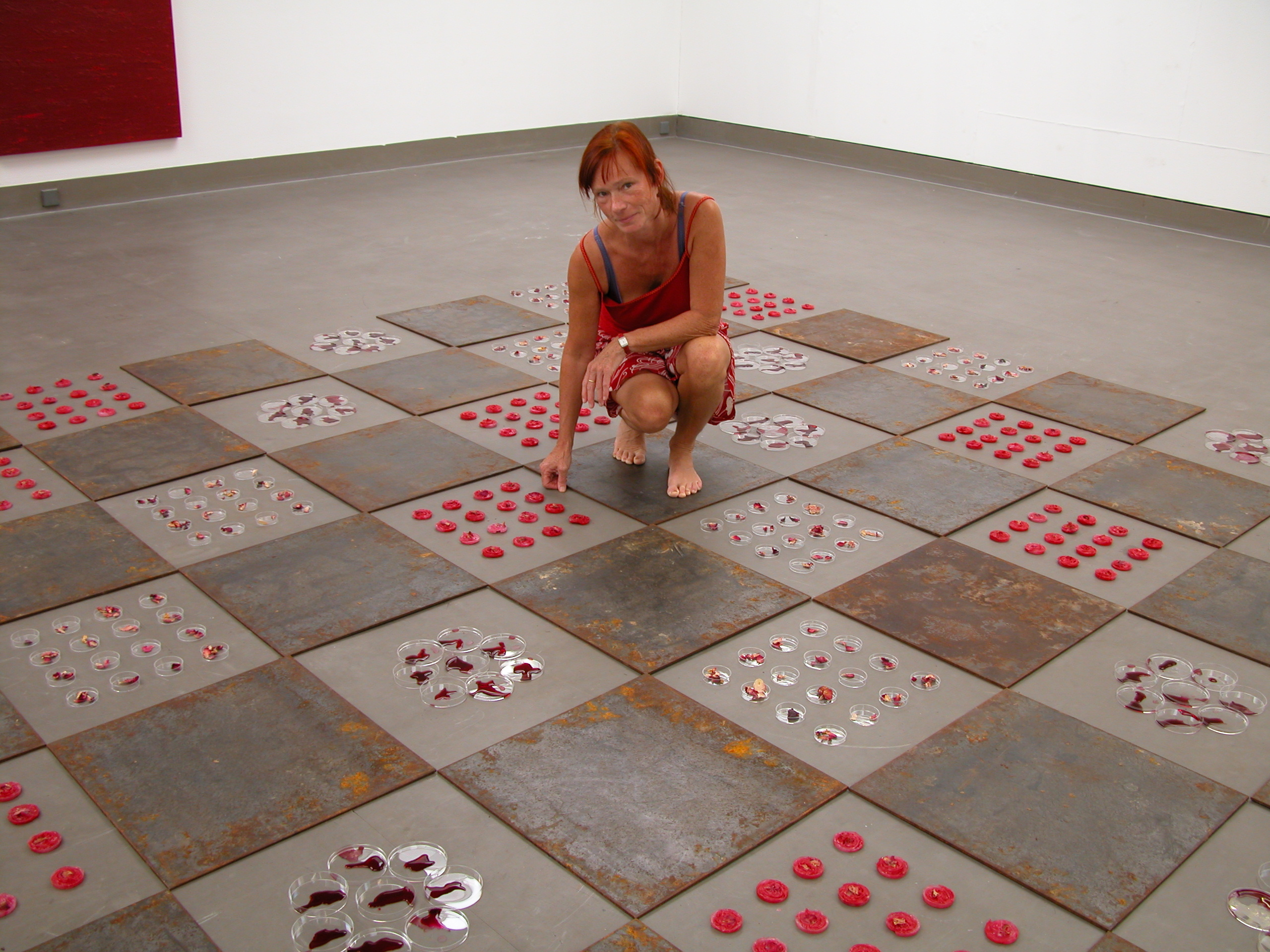 Romana Menze-Kuhn in ihrer Installation